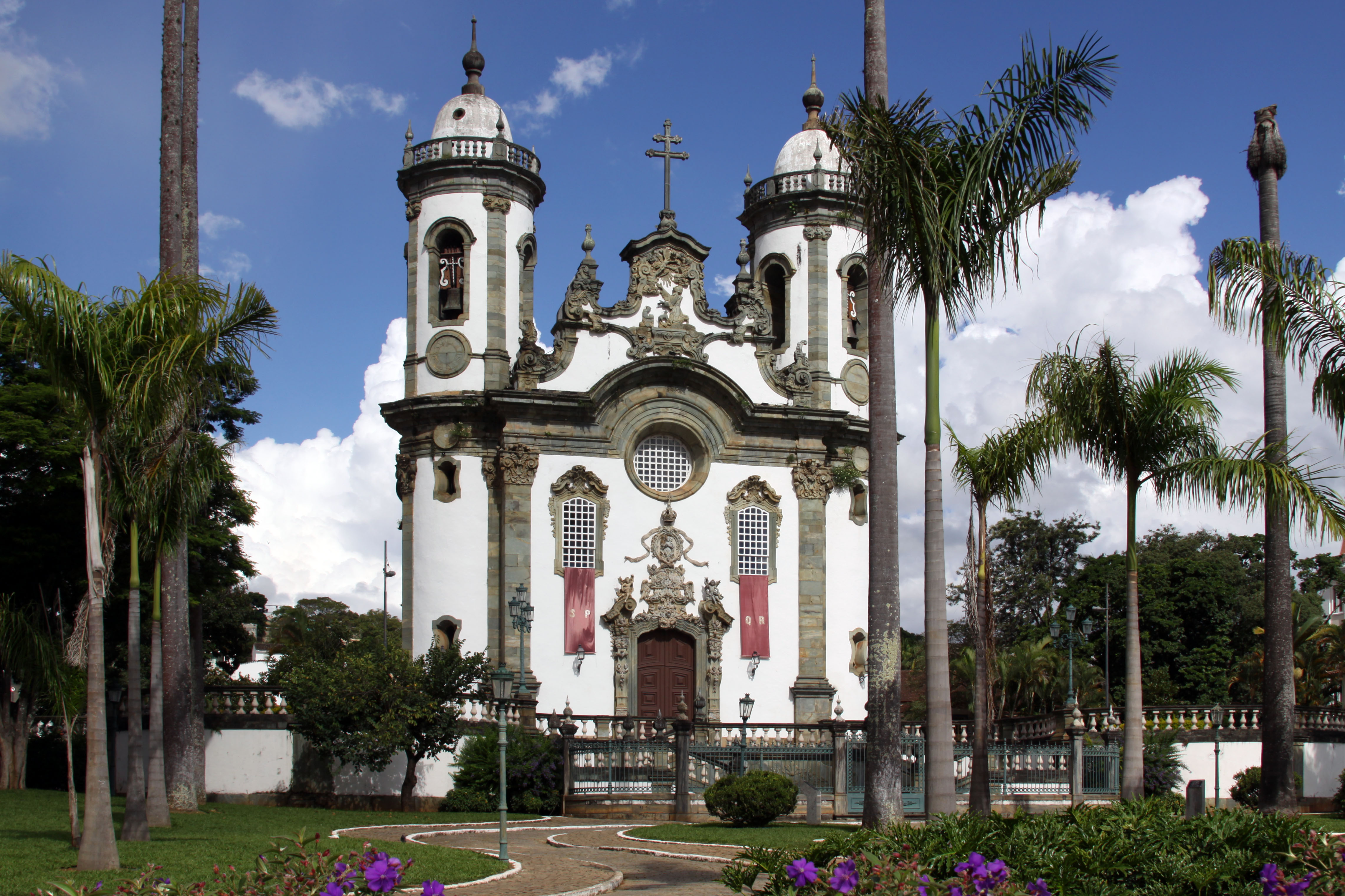 Igreja de São Francisco de Assis em São João del-Rei.